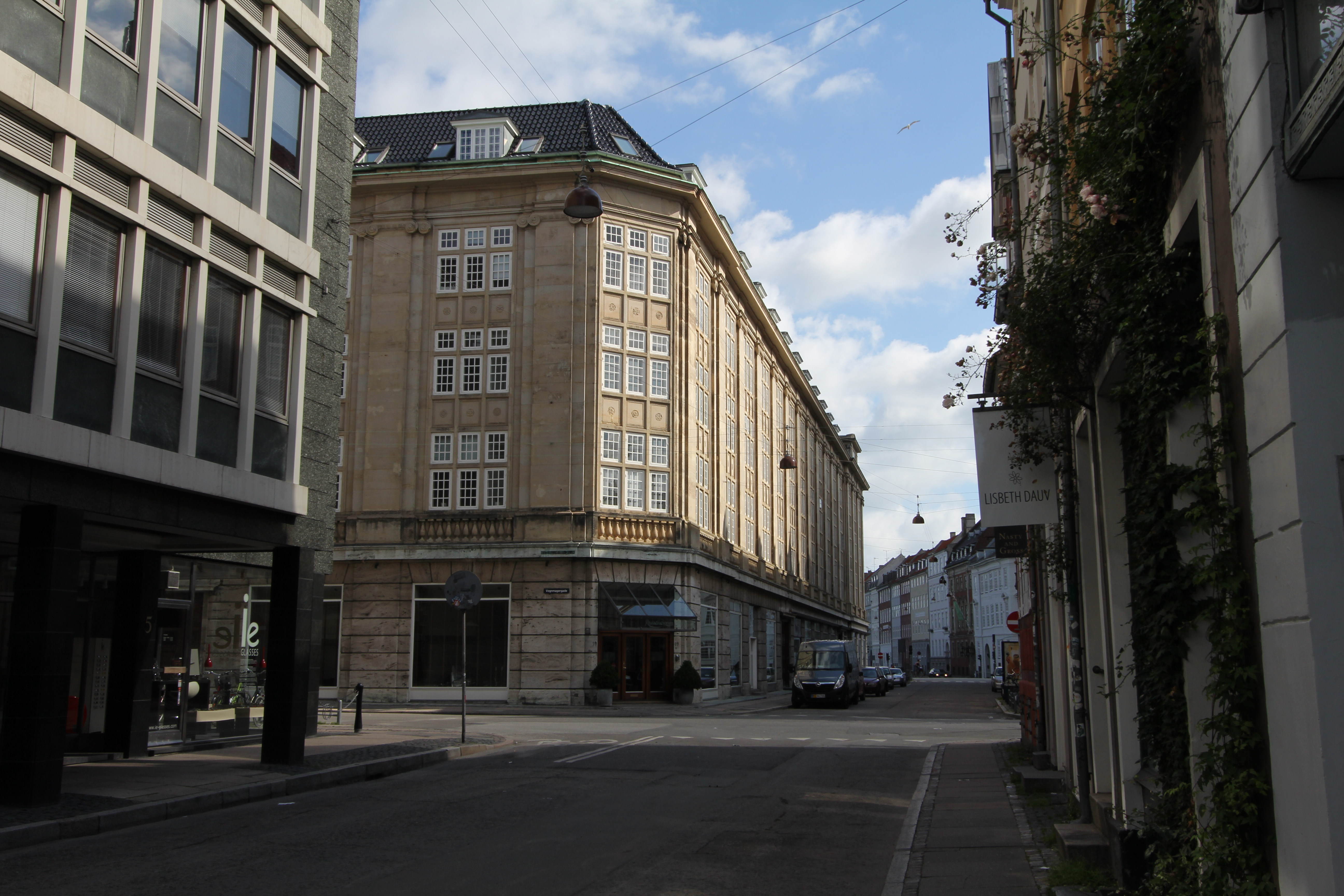 Møntergade in Copenhagen, Denmark